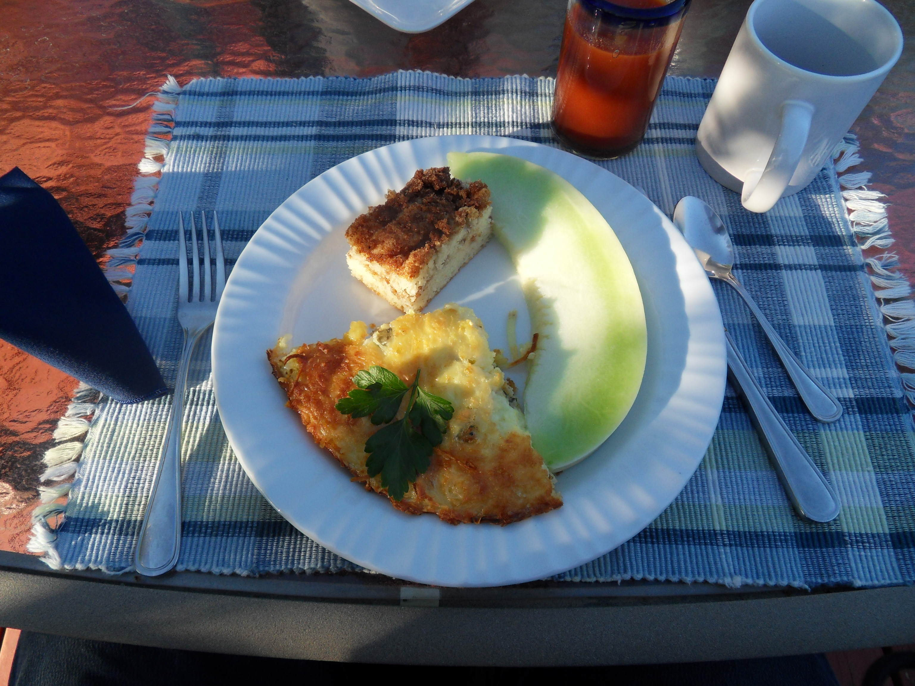 Een ontbijt bij een inn vlakbij Castle Valley, waar we waren op vakantie.